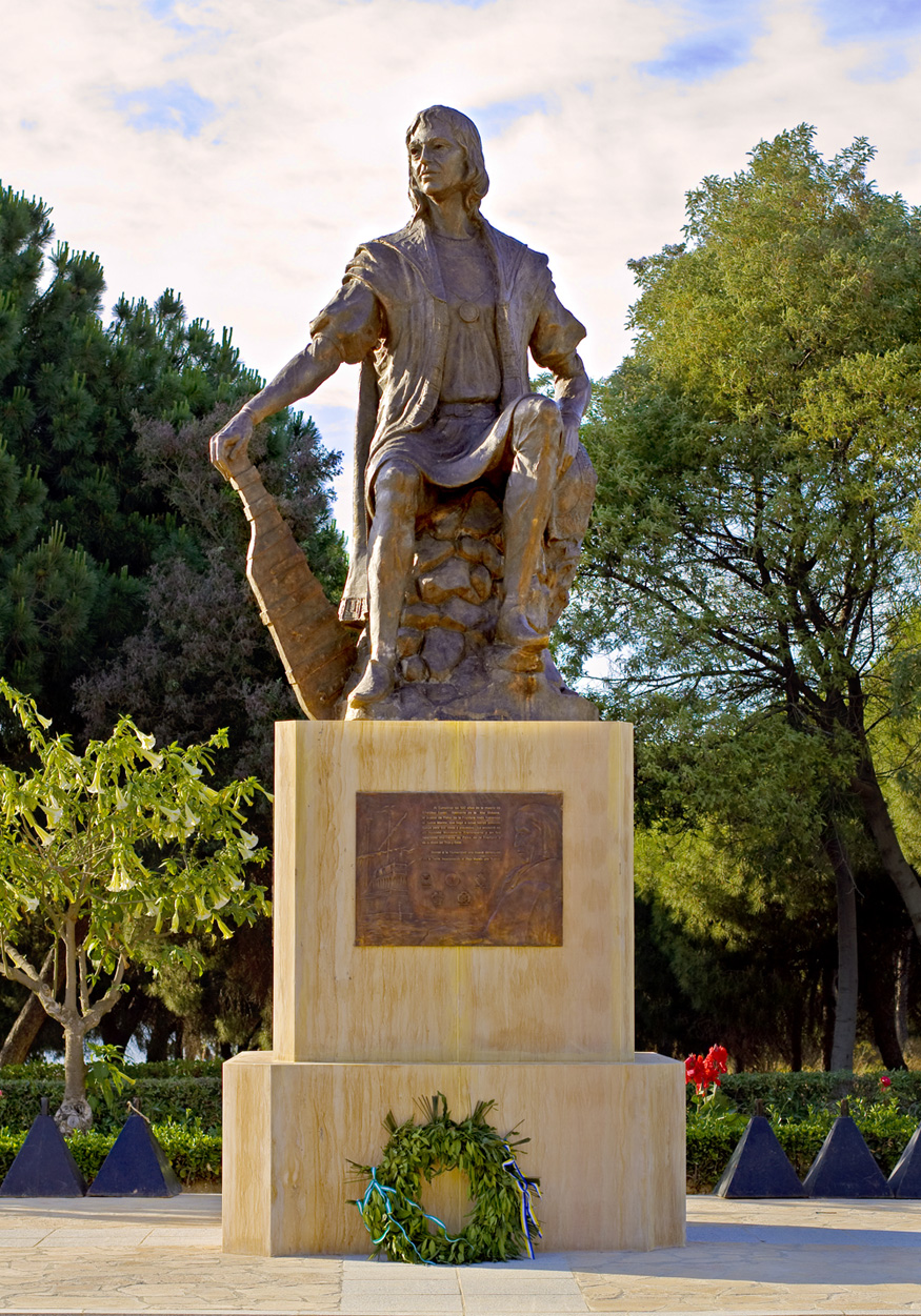 Monumento a Cristóbal Colón, en el paraje de La Rábida, Palos de la Frontera, Huelva, España. La escultura presenta a un Colón joven.